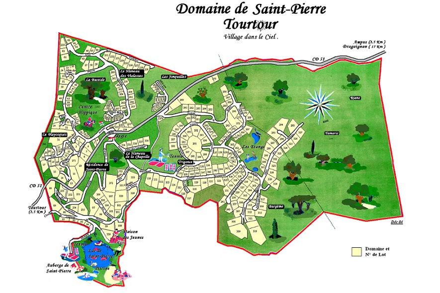 Département du Var, Le Domaine de Saint Pierre s'étend sur les communes de Tourtour et Ampus. Plan général du Domaine affiché sur le bâtiment de la régie d'accueil, permettant au public de s'orienter dans ce vaste ensemble immobilier de 130 hectares